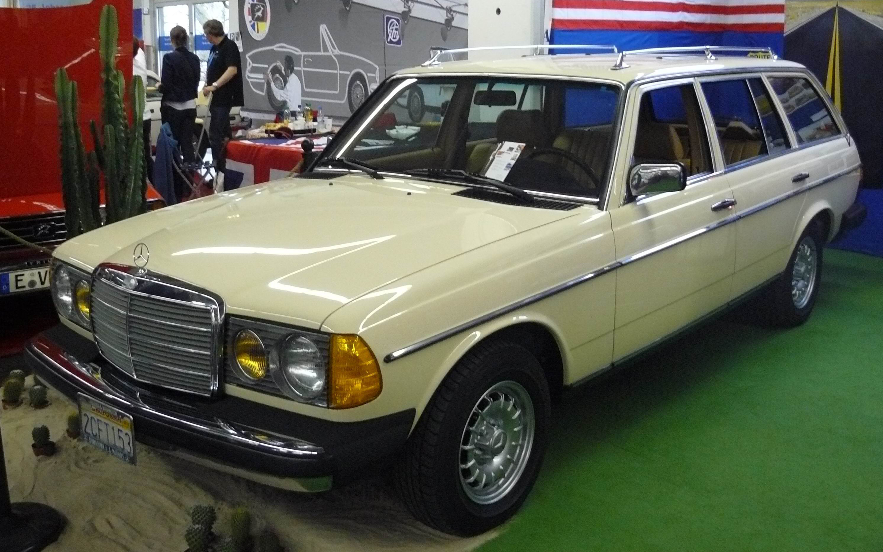 Essen 2011